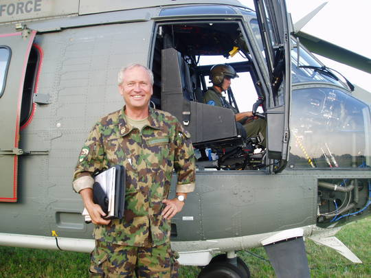 Paul Winiker im Einsatz als Oberstleutnant bei der Truppenübung "Protector".